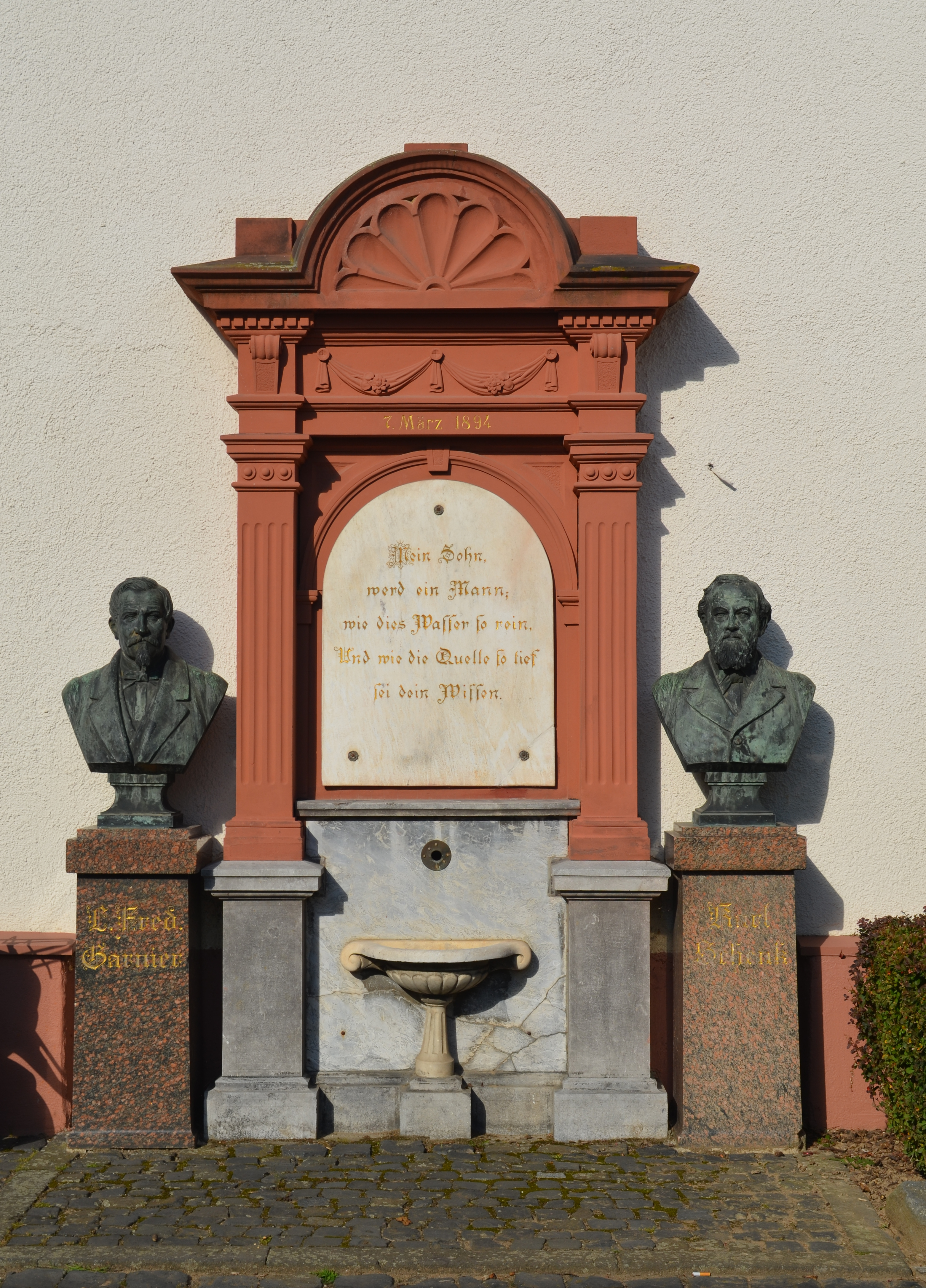 Friedrichsdorf, Institut Garnier 1, Brunnen